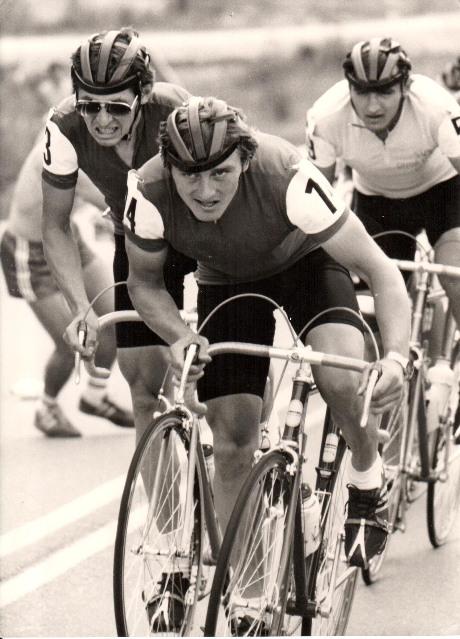 Vladimír Kozárek při závodu